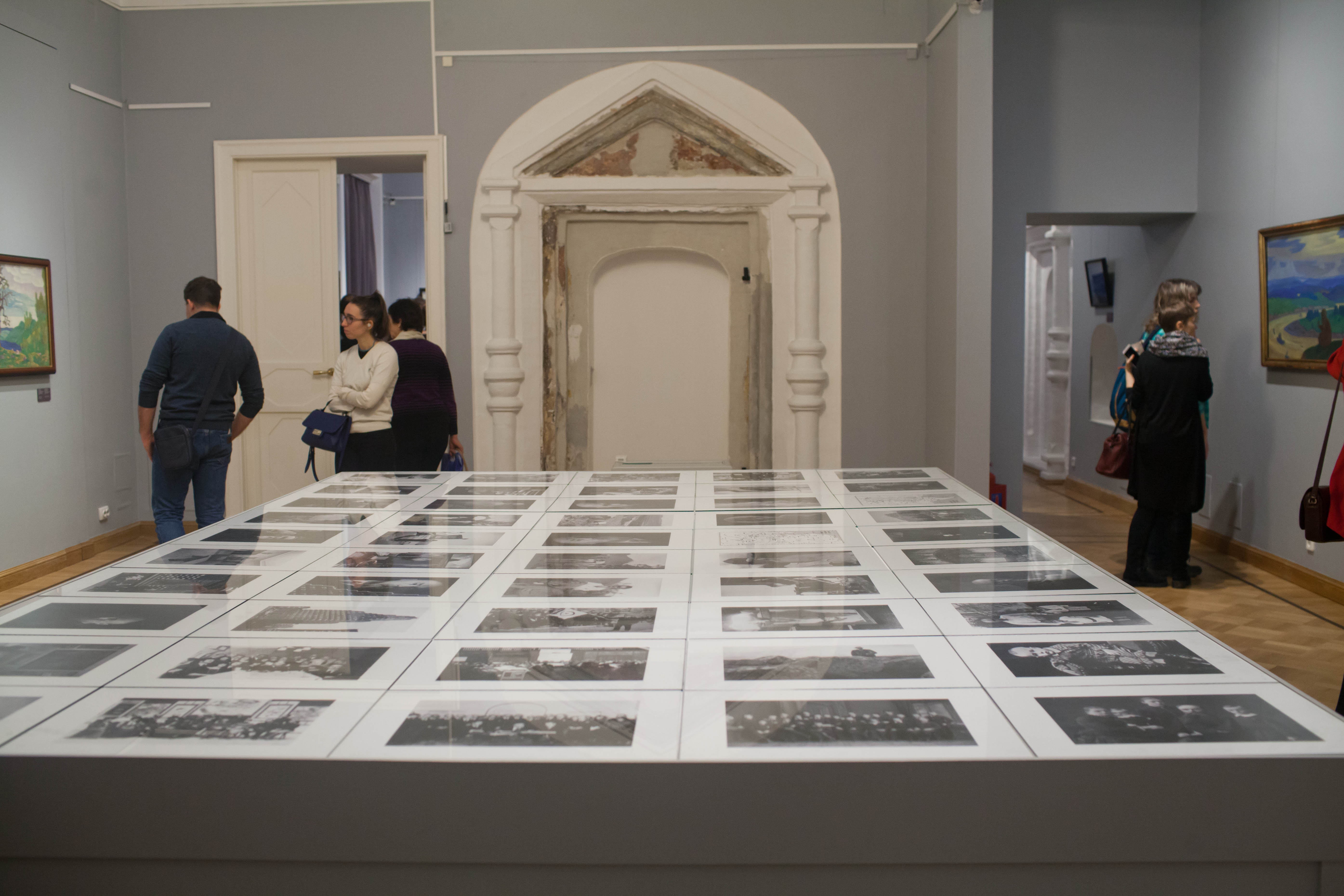 Выставка "Николай Рерих. Восхождение" в Музее Рерихов (Усадьба Лопухиных, Малый Знаменский переулок, д.3/5, стр.4; 20 декабря 2017 – 17 января 2018)